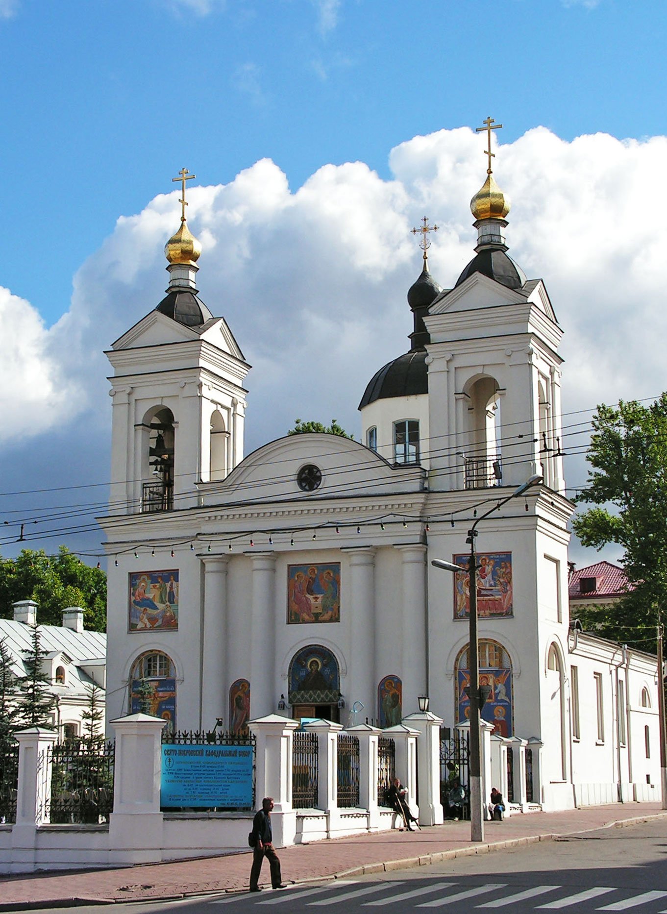 Беларуская (тарашкевіца): Колішні касьцёл трынітарыяў у Віцебску (цяпер Пакроўскі сабор Маскоўскага патрыярхату)